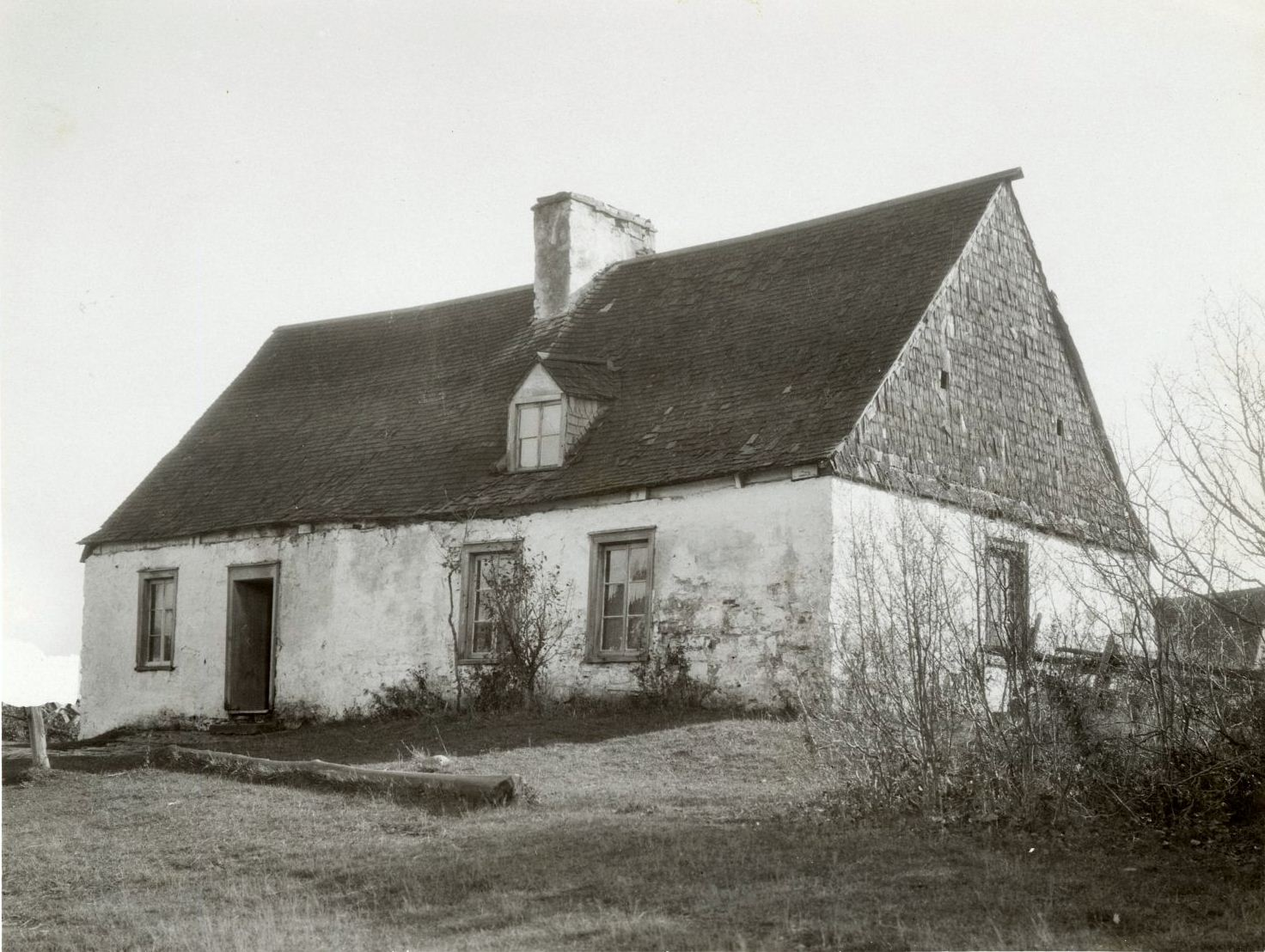 Maison de Cyrille Drouin, Saint-François-de-l'Île-d'Orléans